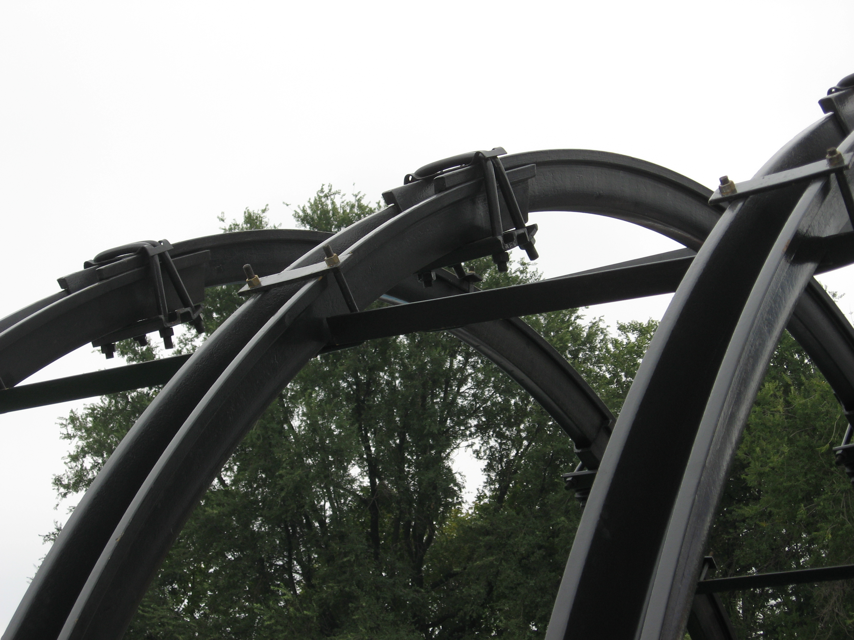 Фото з виставки Вугілля-Майнінг 2010